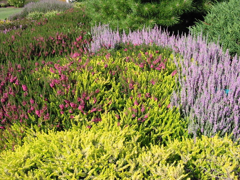 Éricacées en fleur Photographie personnelle prise aux Jardins de Callunes le 18 août 2005 Christian Amet